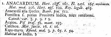 Descriptio of Anacardium_occidentale